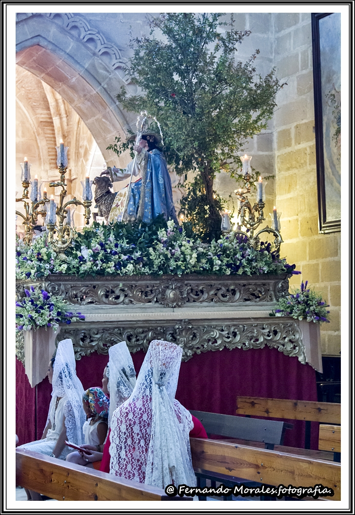 Momentos antes de la Salida Procesional